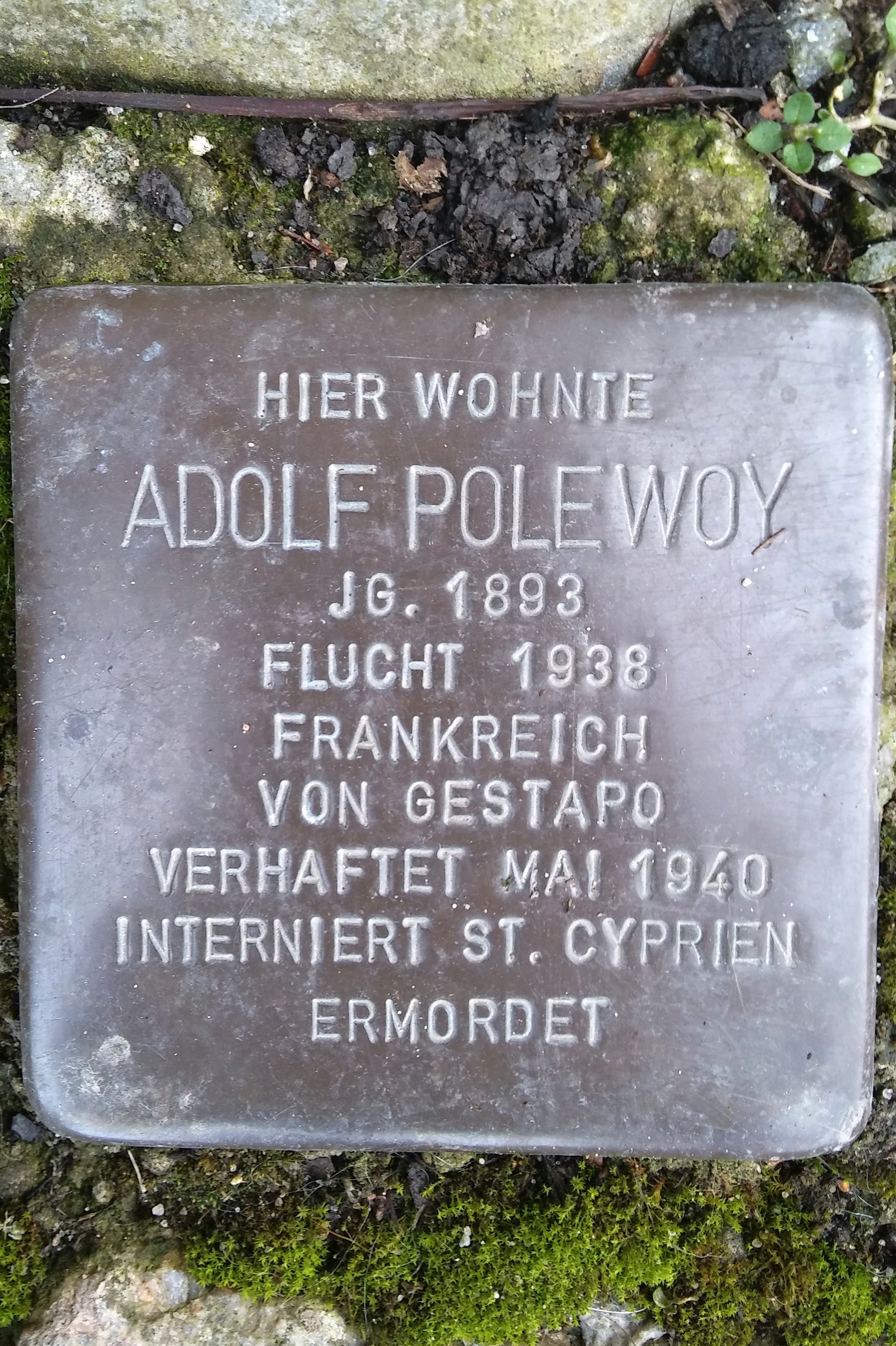 Stralsund, Papenstraße 4, Stolperstein Adolf Polewoy (2017-02-22)